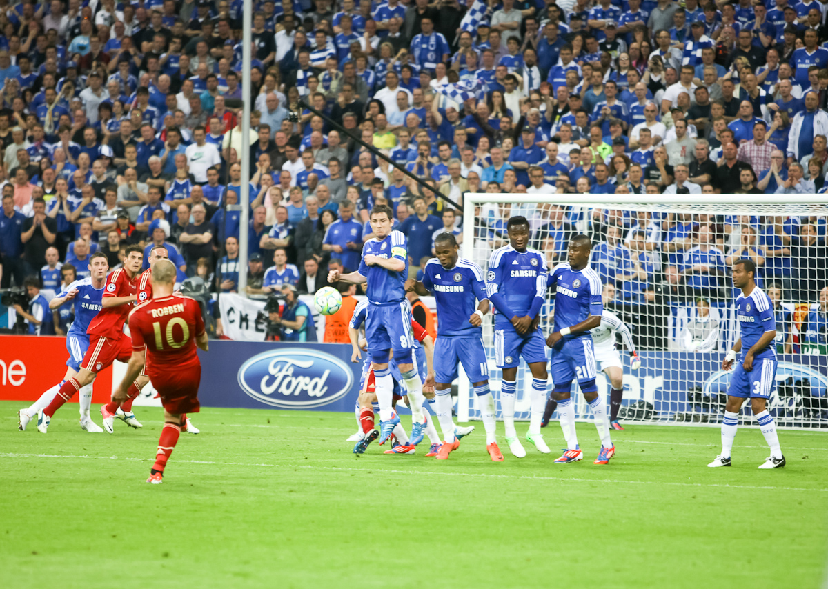 RA1_6085